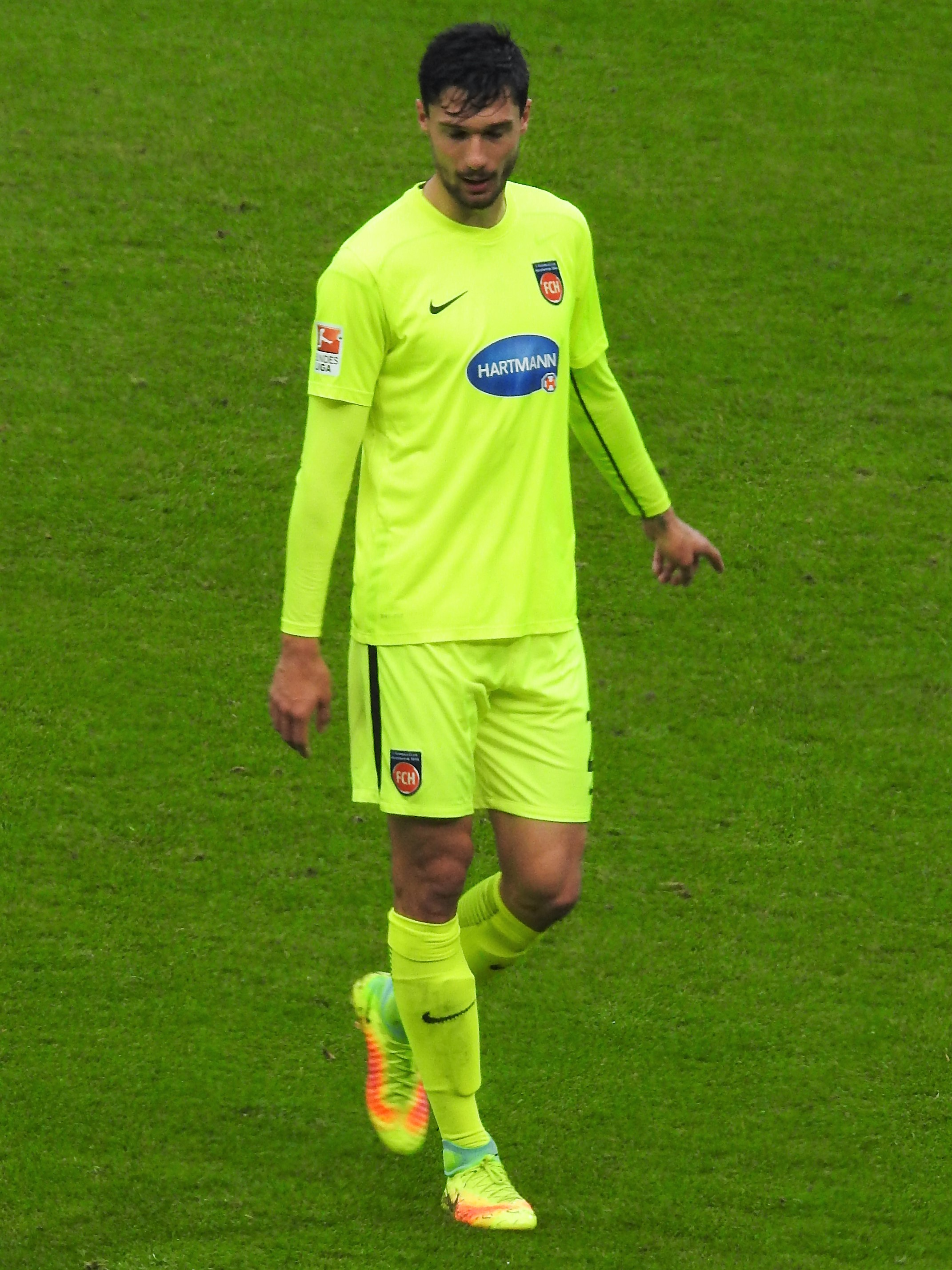 Tim Kleindienst im Trikot vom 1.FC Heidenheim